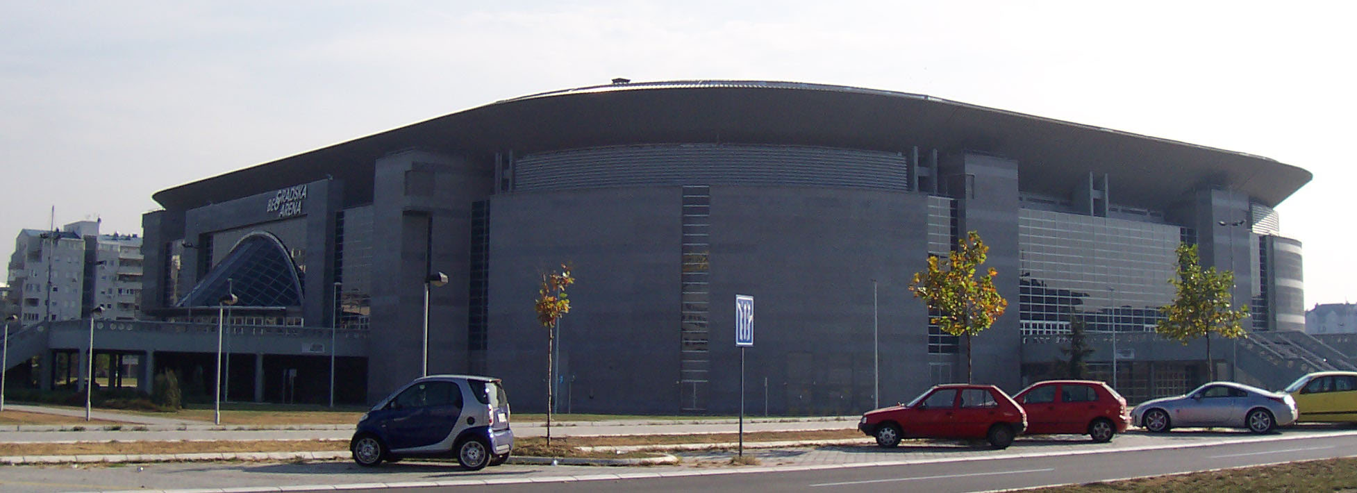 Belgrade Arena